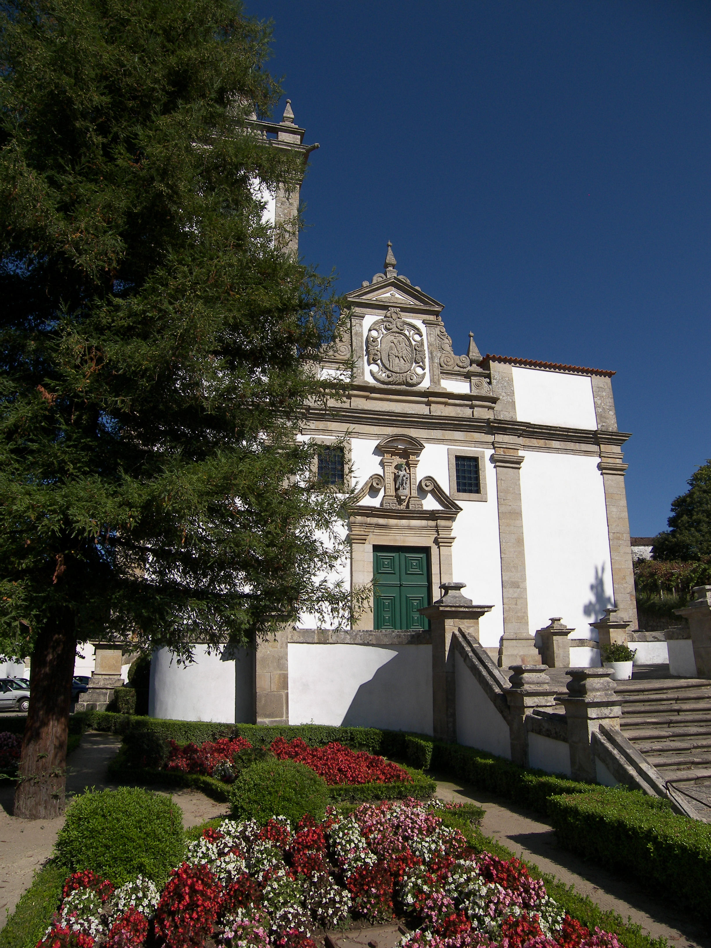 Ponte da Barca - Kirche